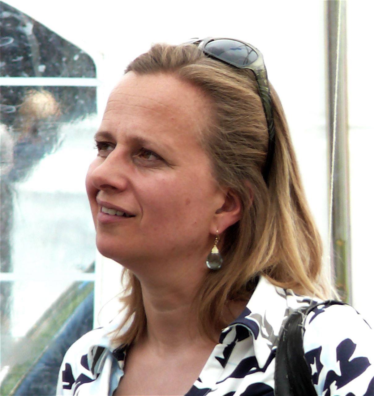 Lousewies van der Laan. Gefotografeerd op het plein in Den Haag tegenover het tweede kamergebouw